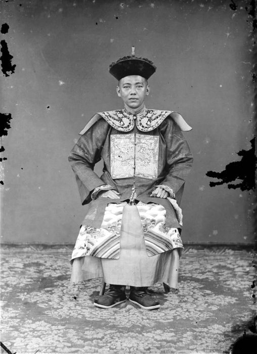 Negatief. Portret van een Chinese luitenant te Bangil, Java